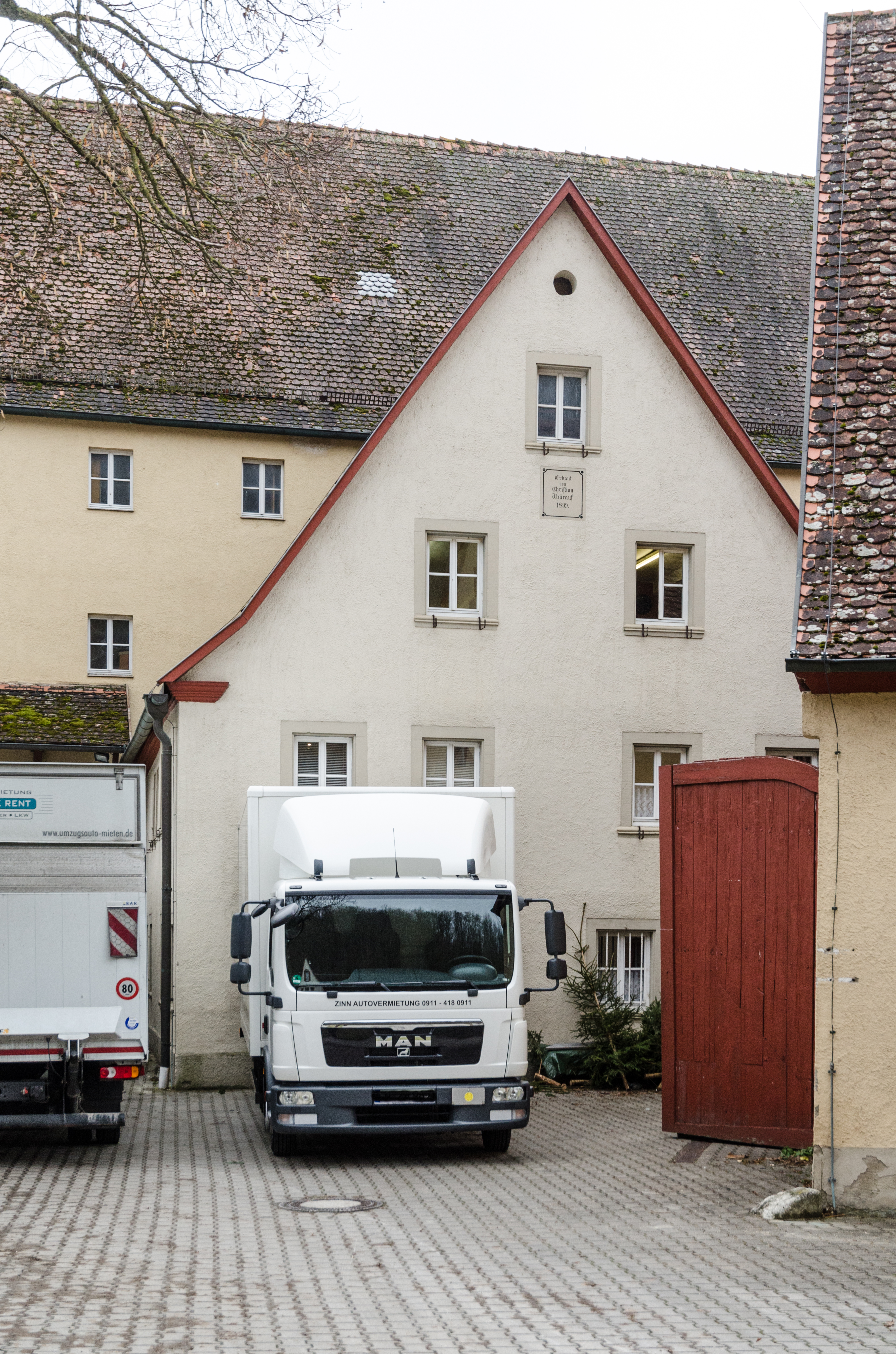 Rothenburg ob der Tauber, Kurze Steig 14, Wohnhaus